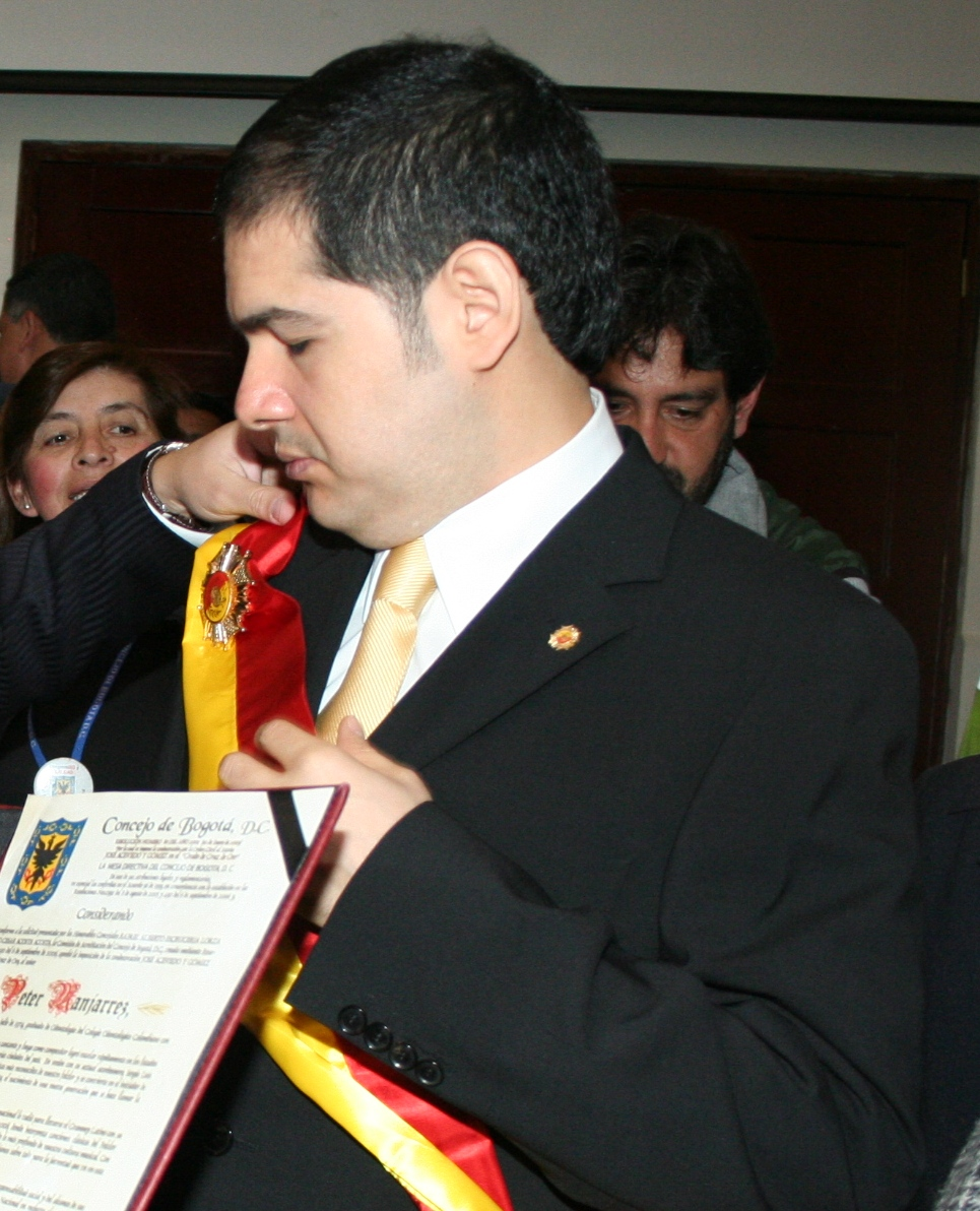 condecoracion por parte del concejal julio cesar acosta a peter manjarres en Bogotá.